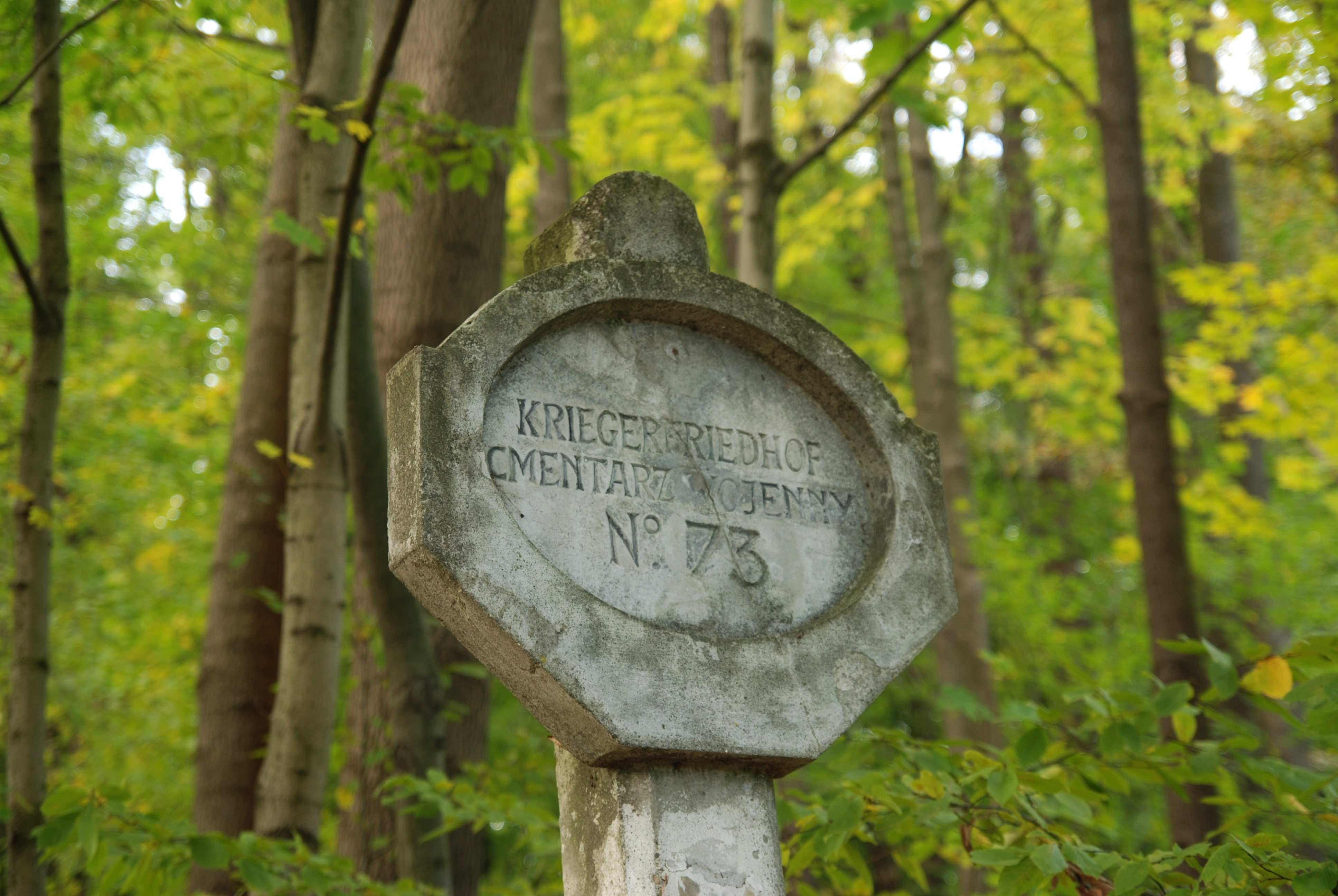 wieś Szymbark (województwo małopolskie)